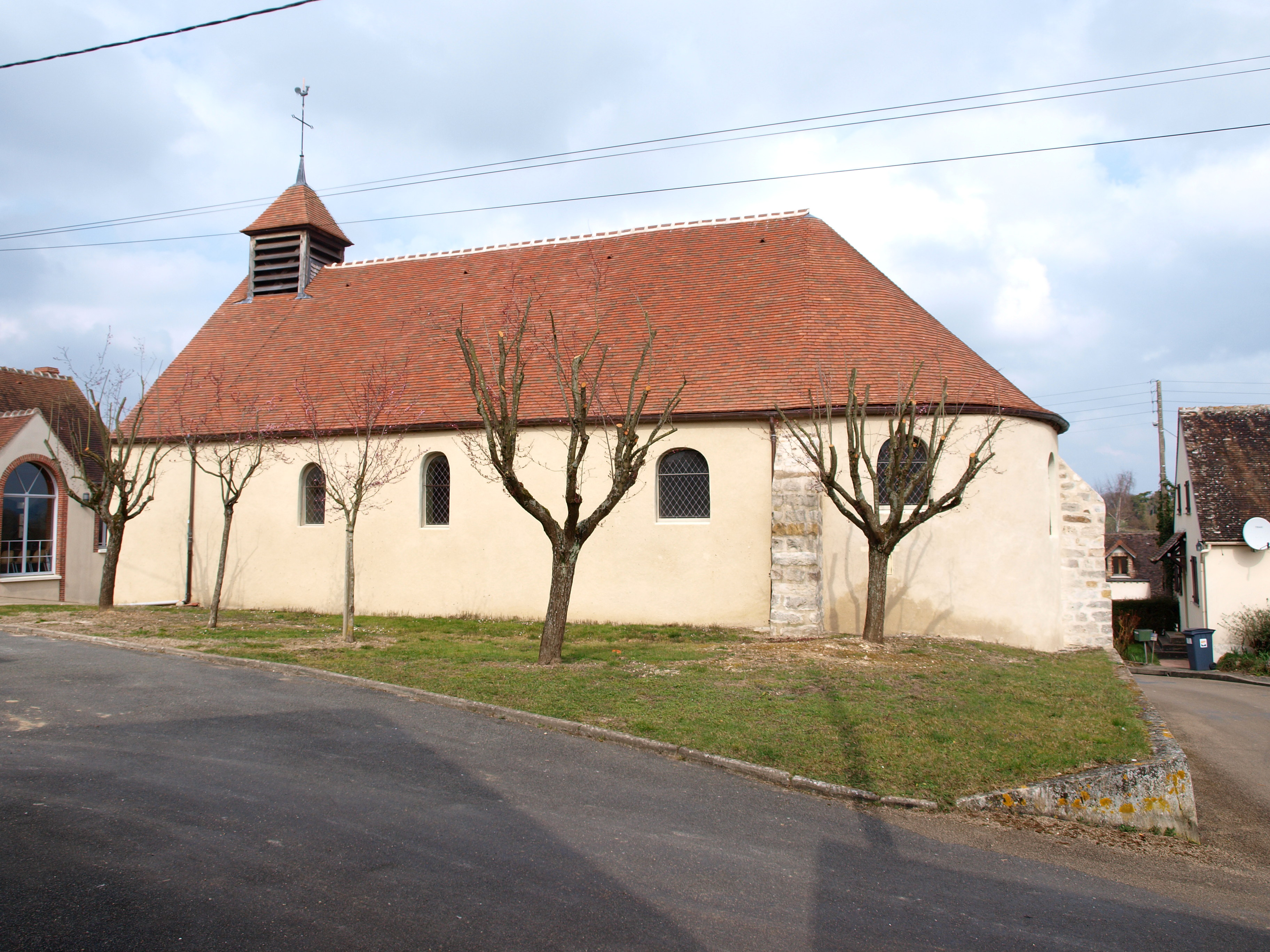 Église de Villenavotte (Yonne, France)